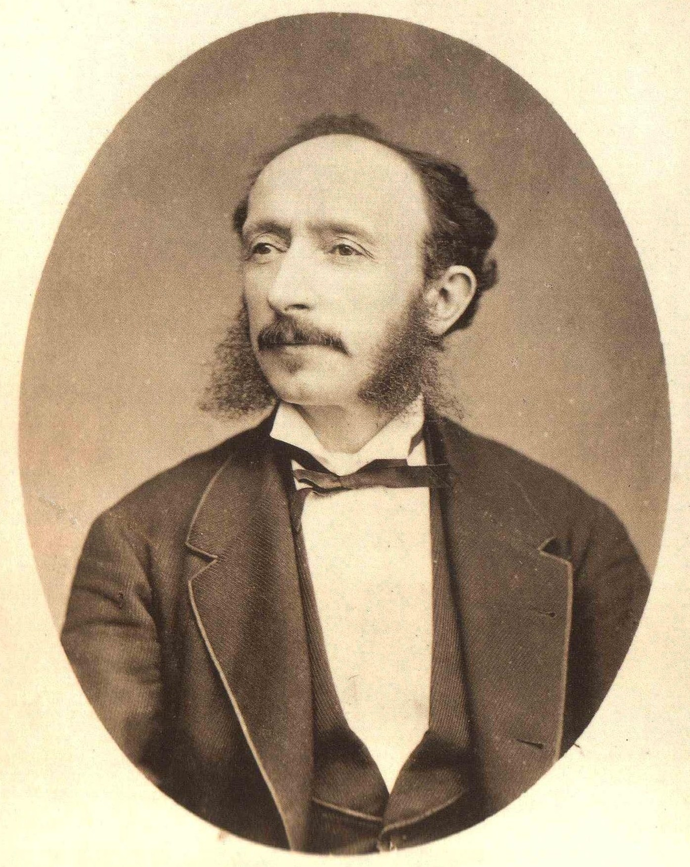 Alfonso Cavagnari (1831-1881), avvocato e politico parmigiano.